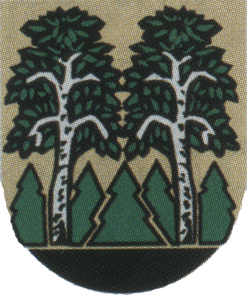 Logo of Heidersdorf